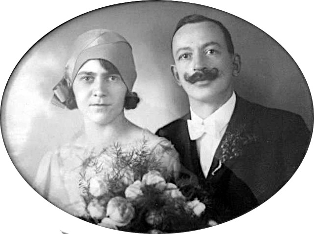 Gustav Adolf Jäger st. jeho žena Emilie, rozená Rösslerová (satební fotografie z roku 1877)